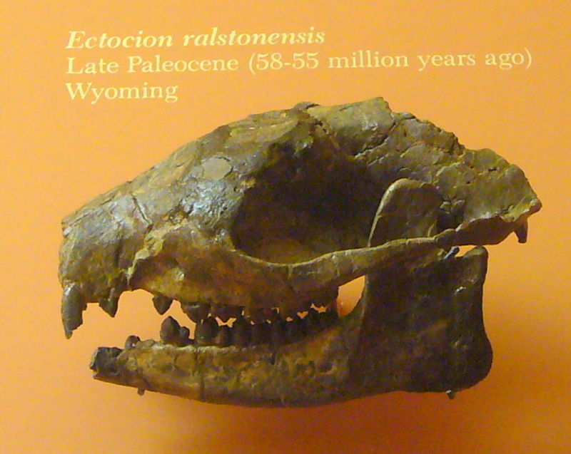 Ectocion ralstonensis Granger 1